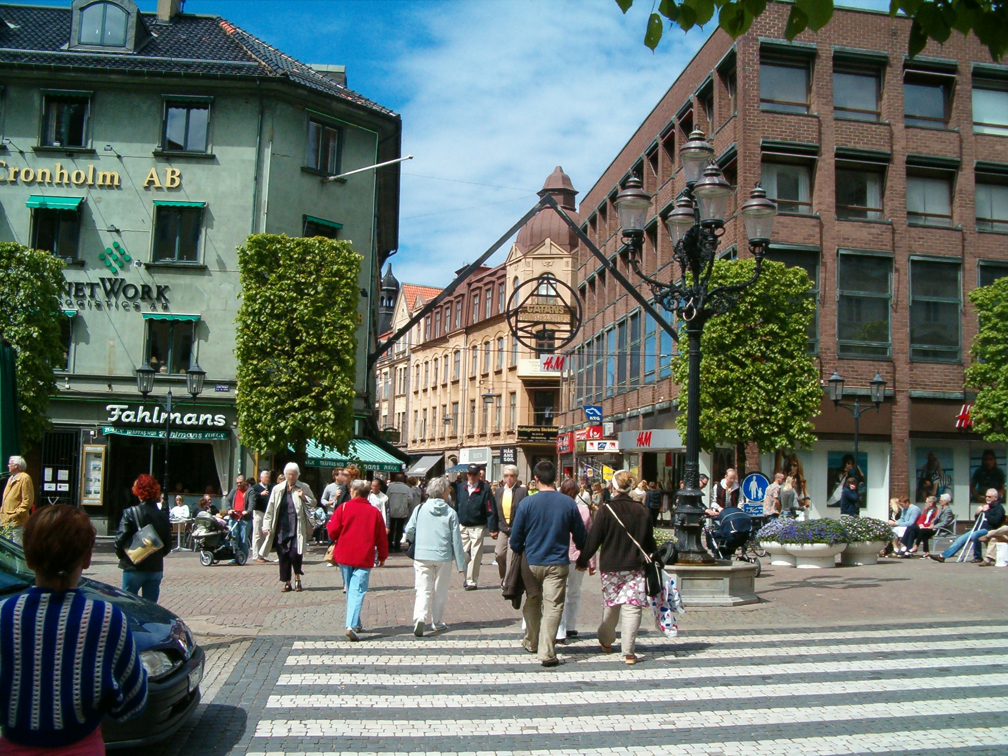 Kullagatan, shopping street in Helsingborg, Sweden.